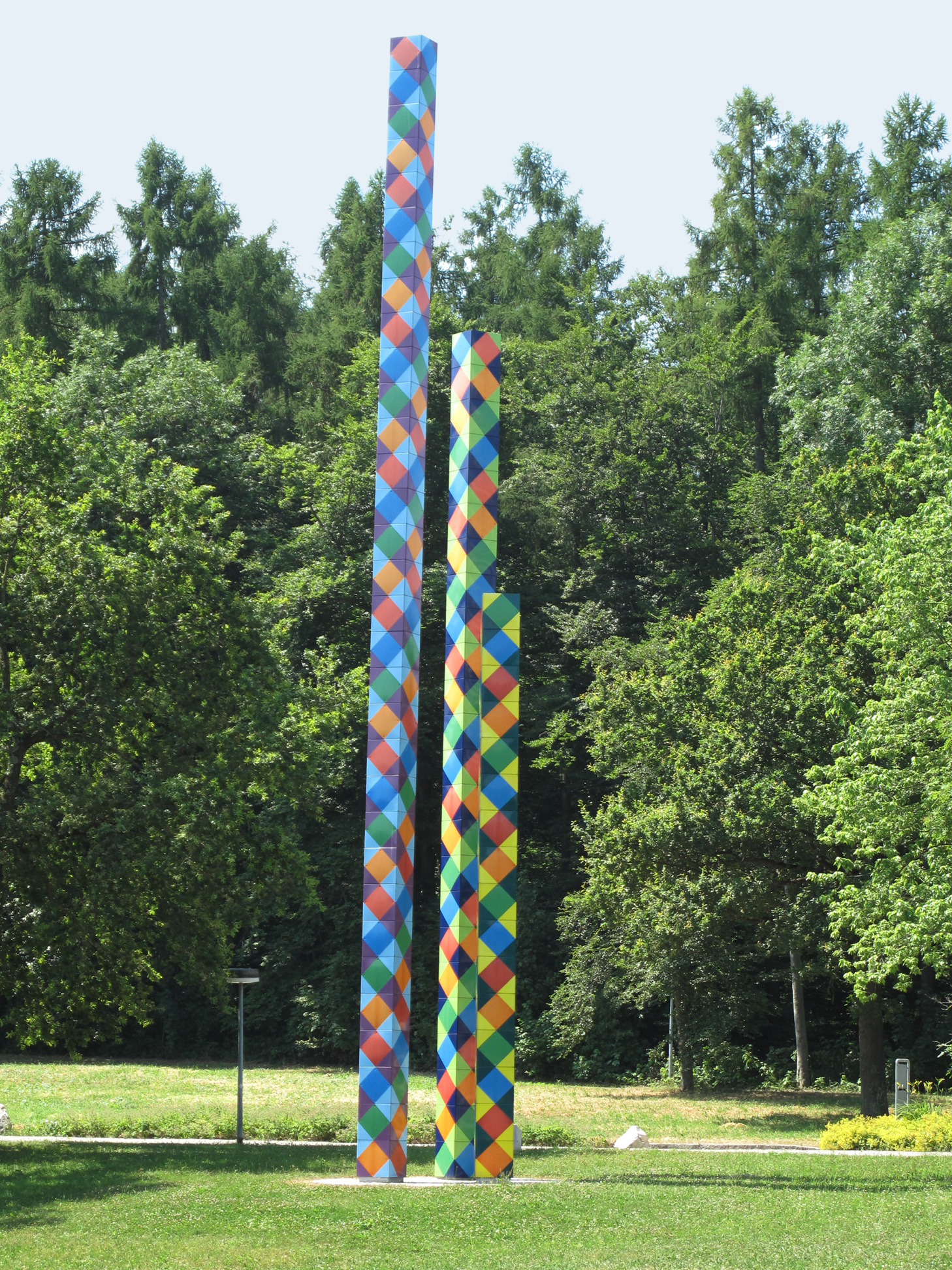 Max Bill, Drei Bildsäulen, 1977, - Kunstpfad Universität Ulm, Deutschland, Baden-Württemberg